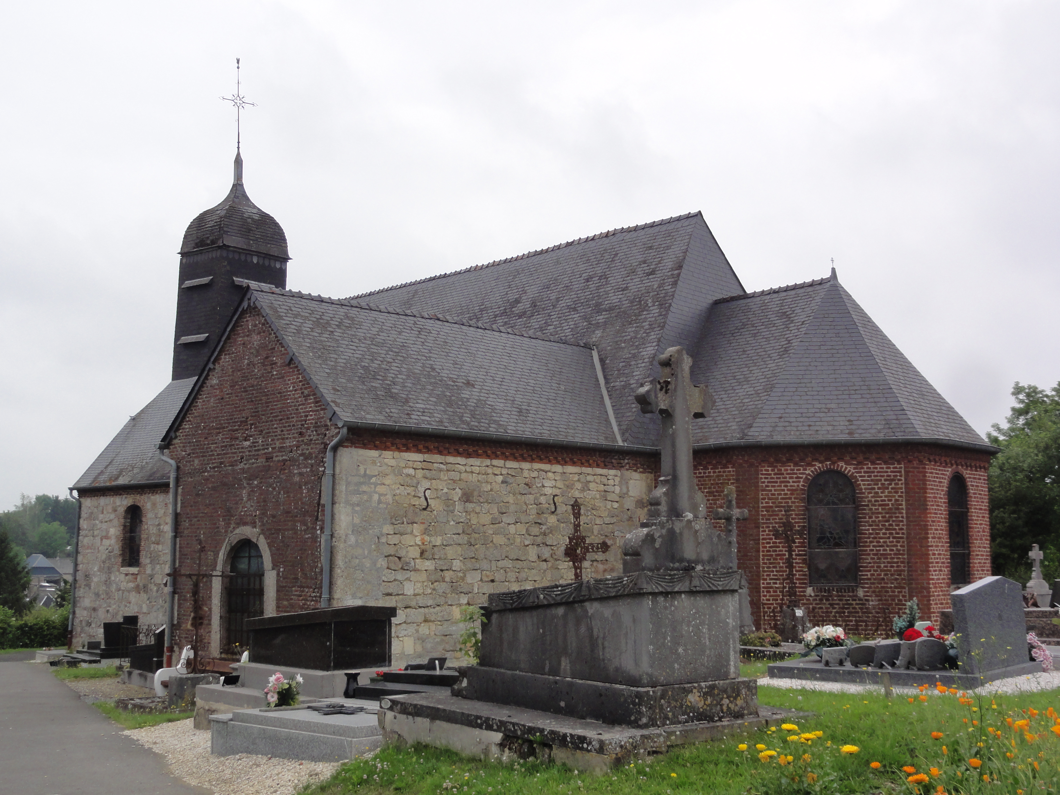 Bucilly (Aisne) église